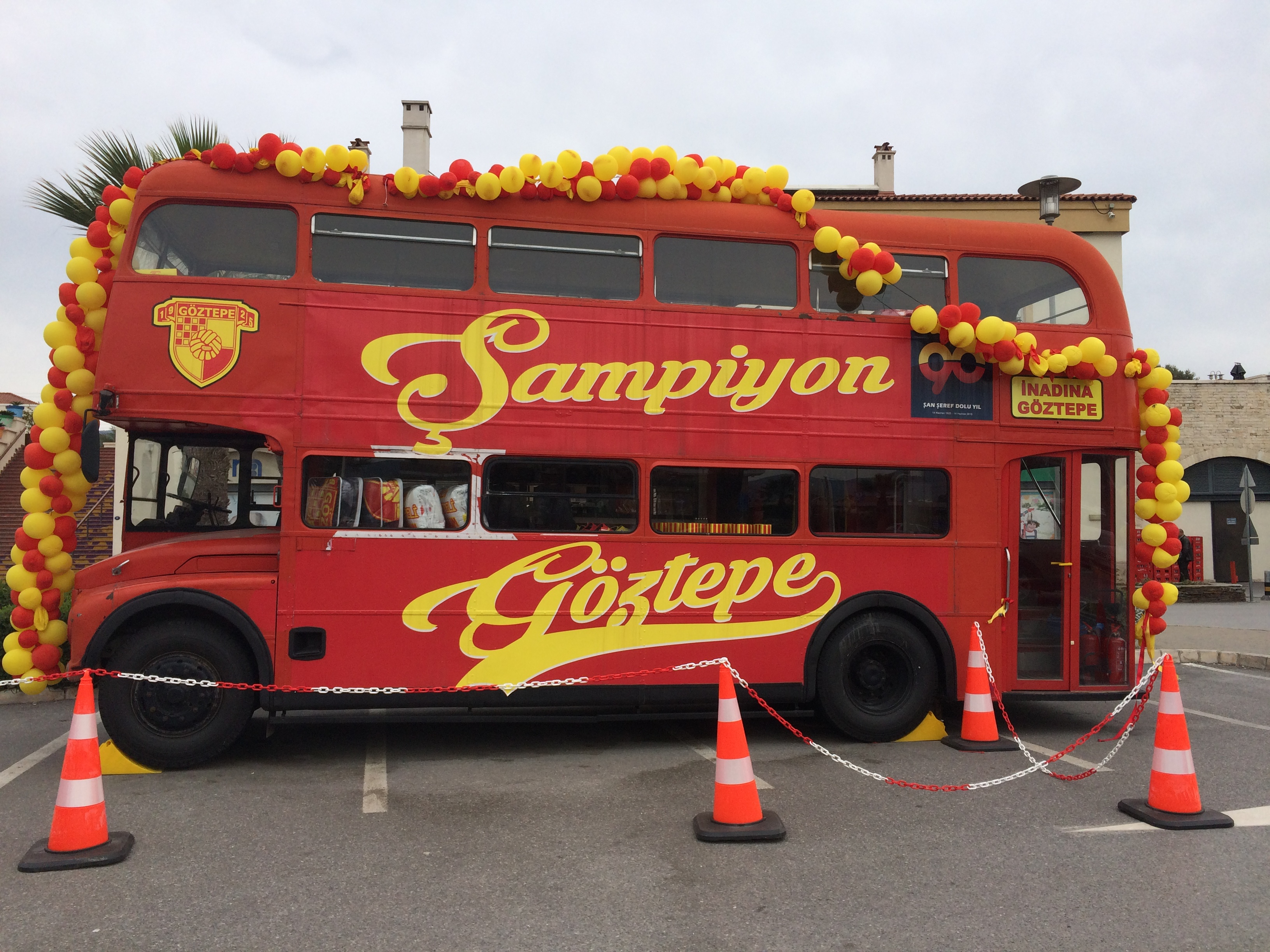 Göztepe Bus